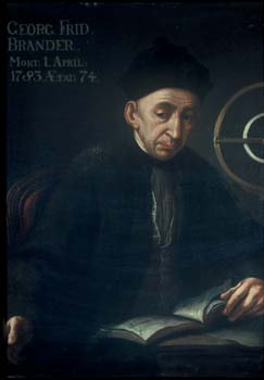 Gemälde: Der Präzisionsmechaniker Georg Friedrich Brander (1713-1783)